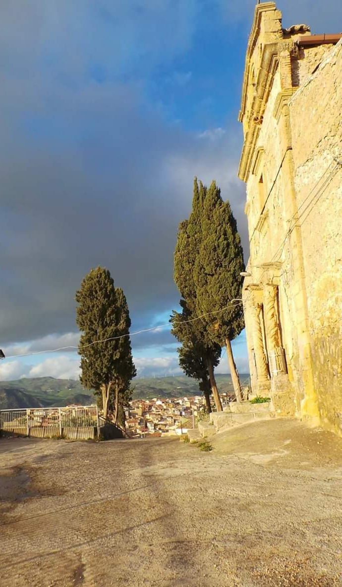 Chiesa di Santa Croce, Leonforte